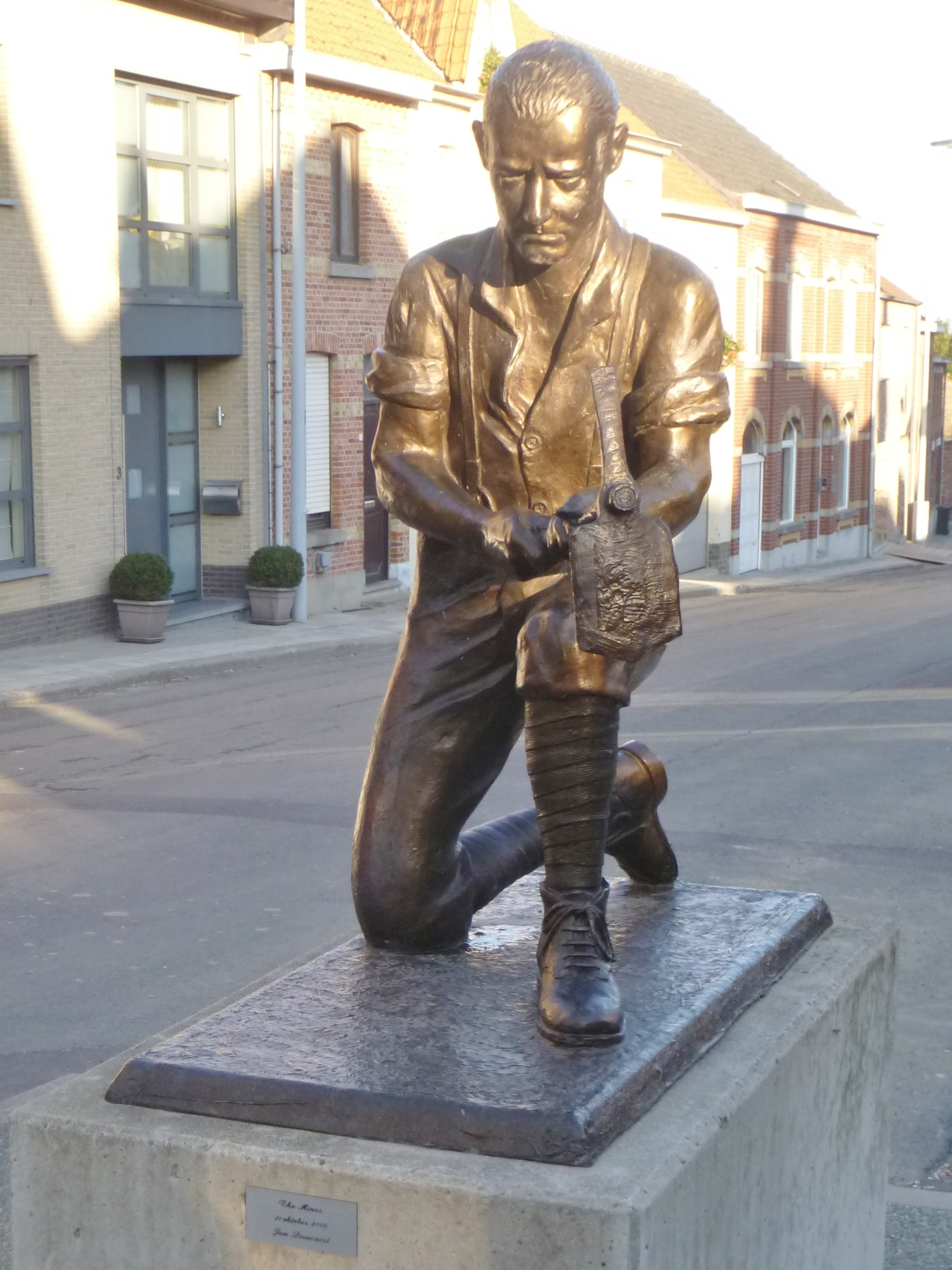 "The Miner", beeld door de Oostduinkerkse beeldhouwer Jan Dieusart voor de Sint-Medarduskerk in Wijtschate , België